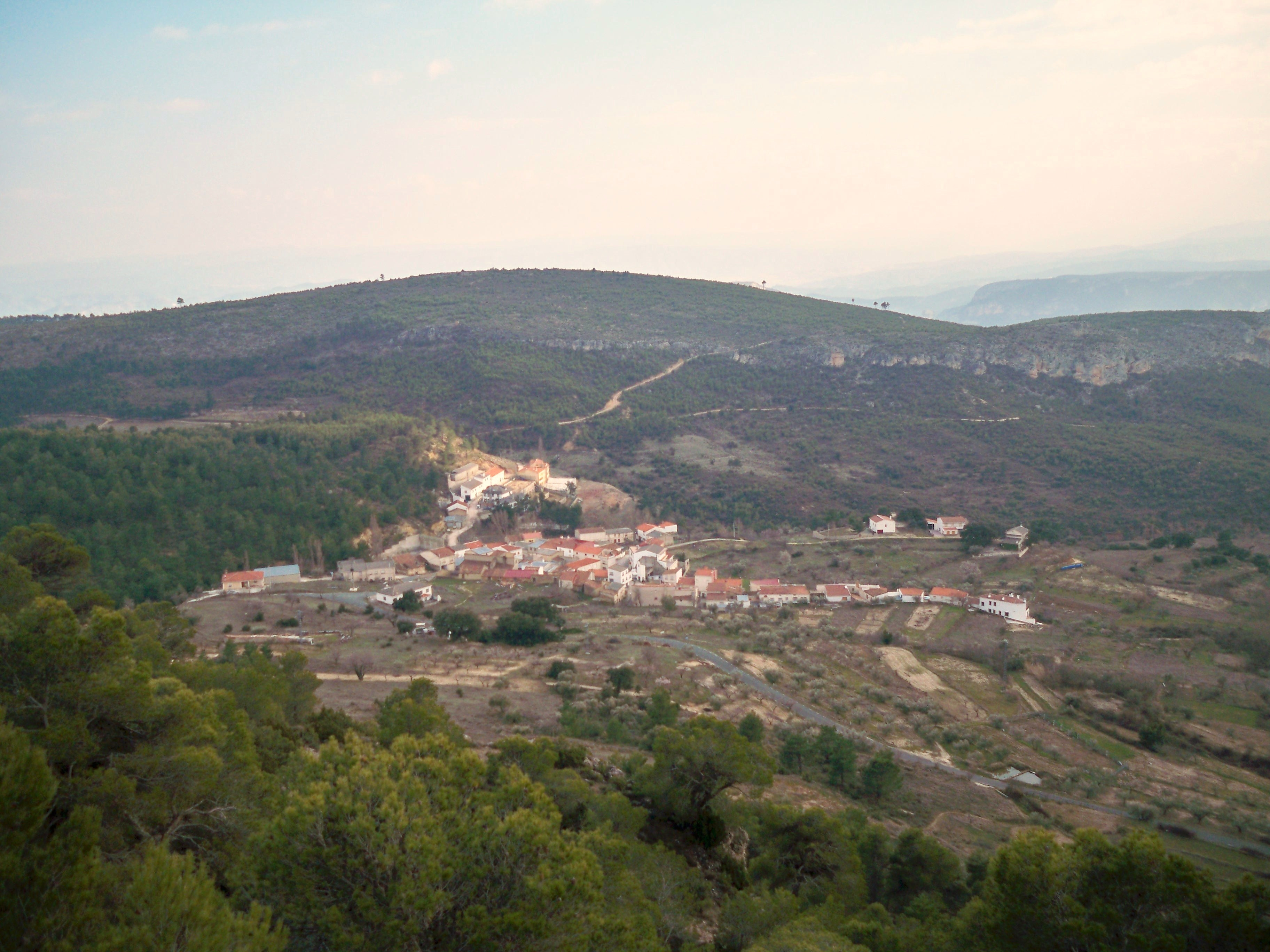 Vista de la localidad de Torre - Pedro (Molinicos - Albacete)